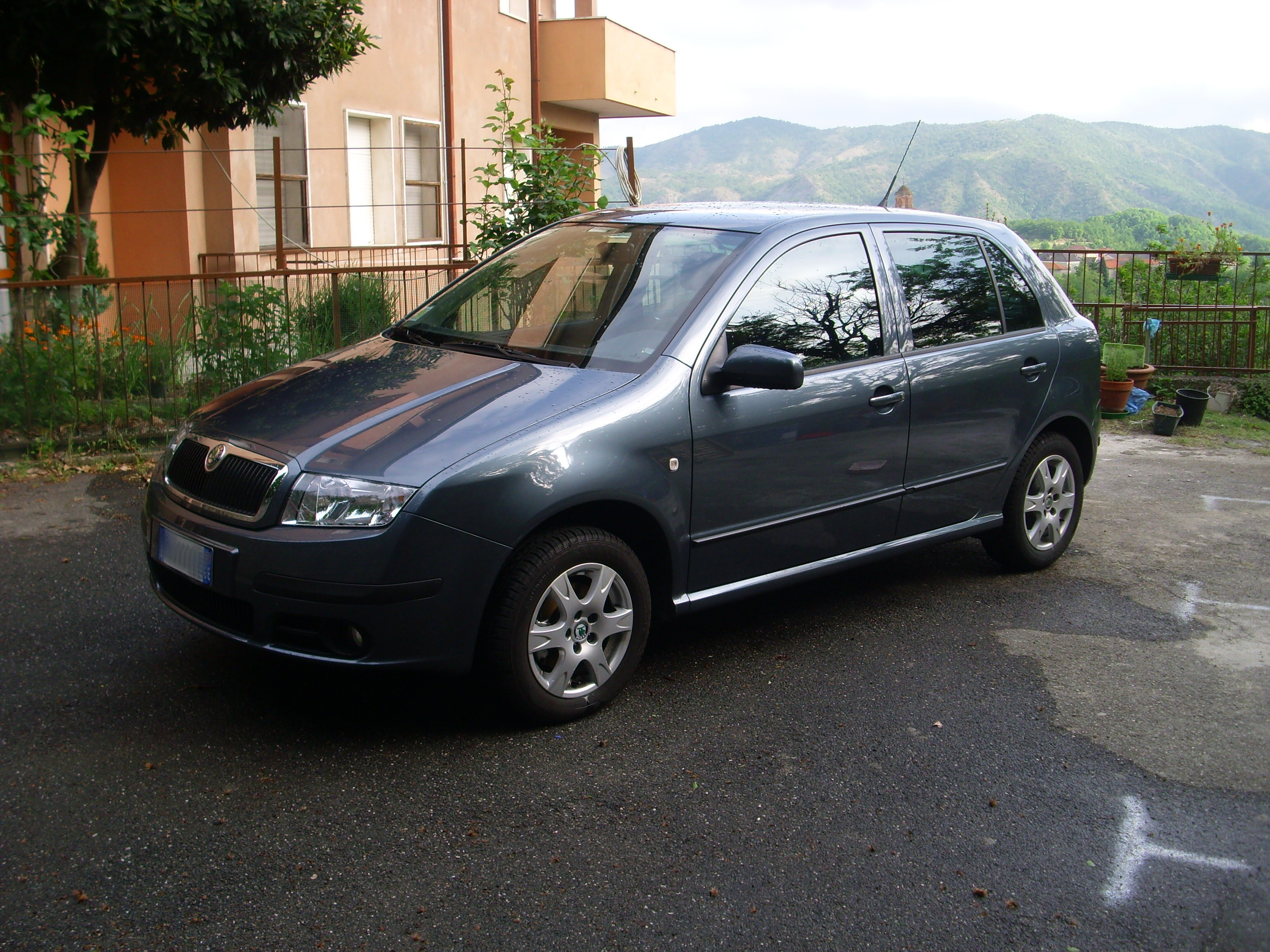 Skoda Fabia 1.4 benzina